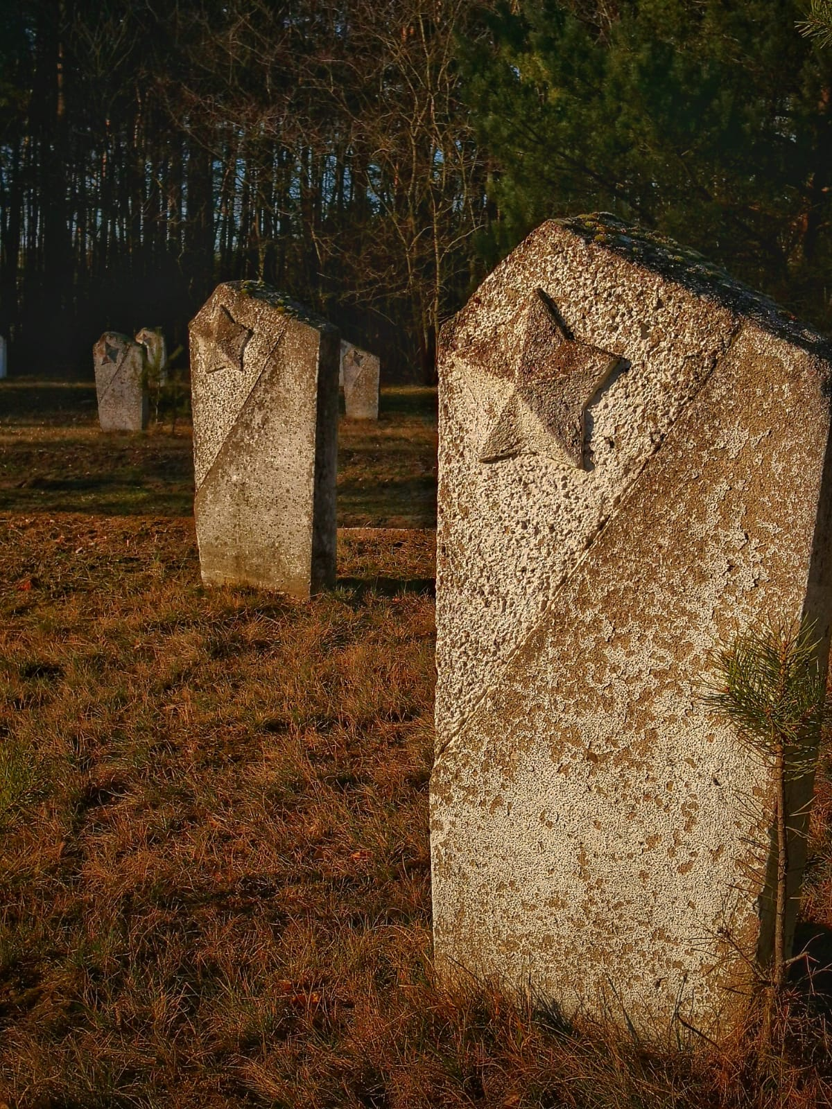 Cmentarz radziecki pod Toruniem